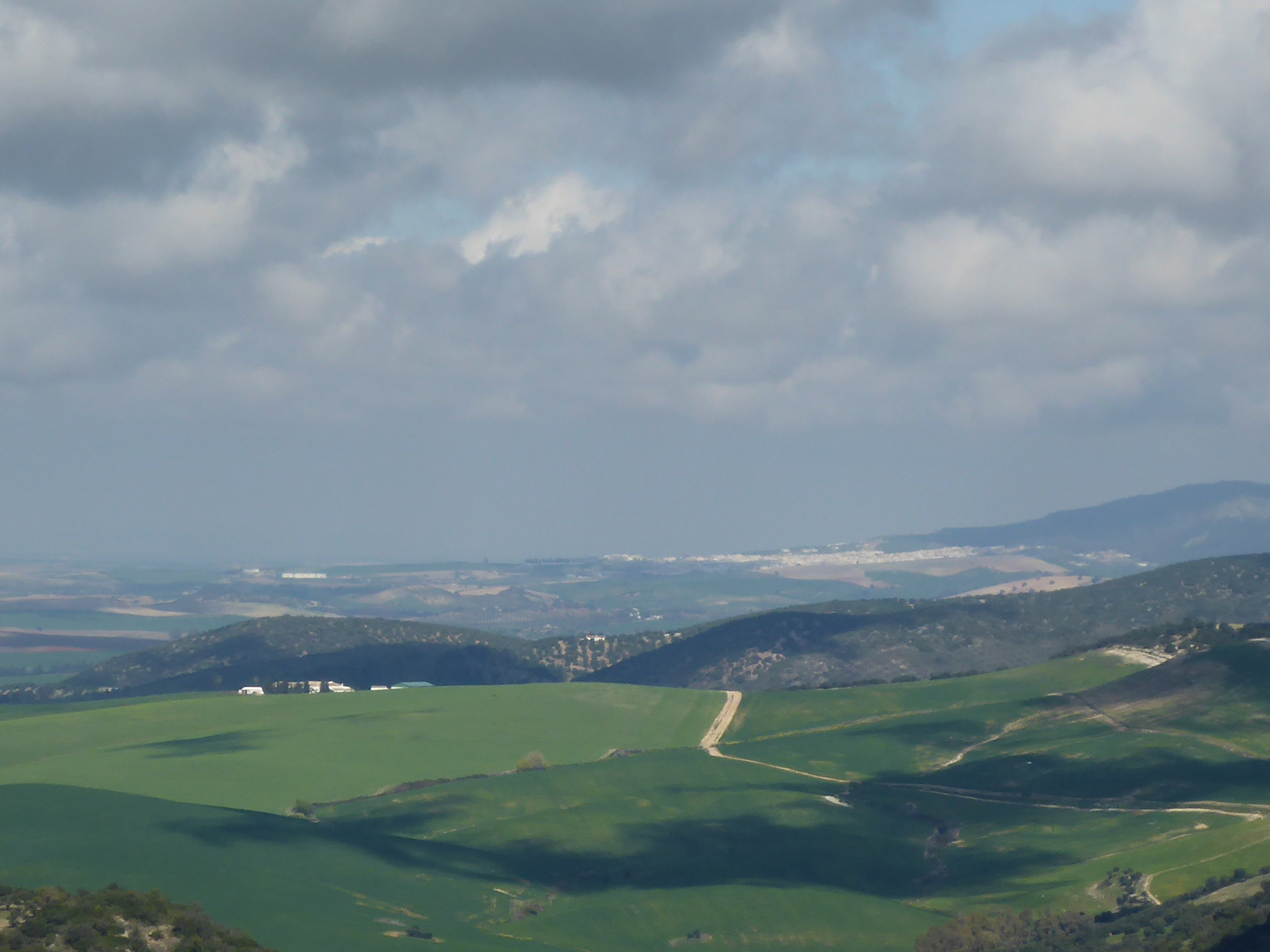 Montellano desde el Instituto Carlos III de Prado del Rey, Andalucía (España)